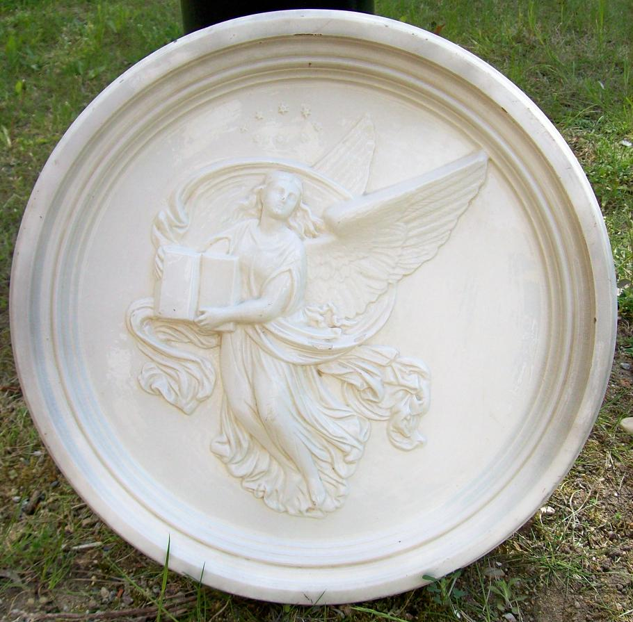 Ofenkachel rund Durchmesser 400mm